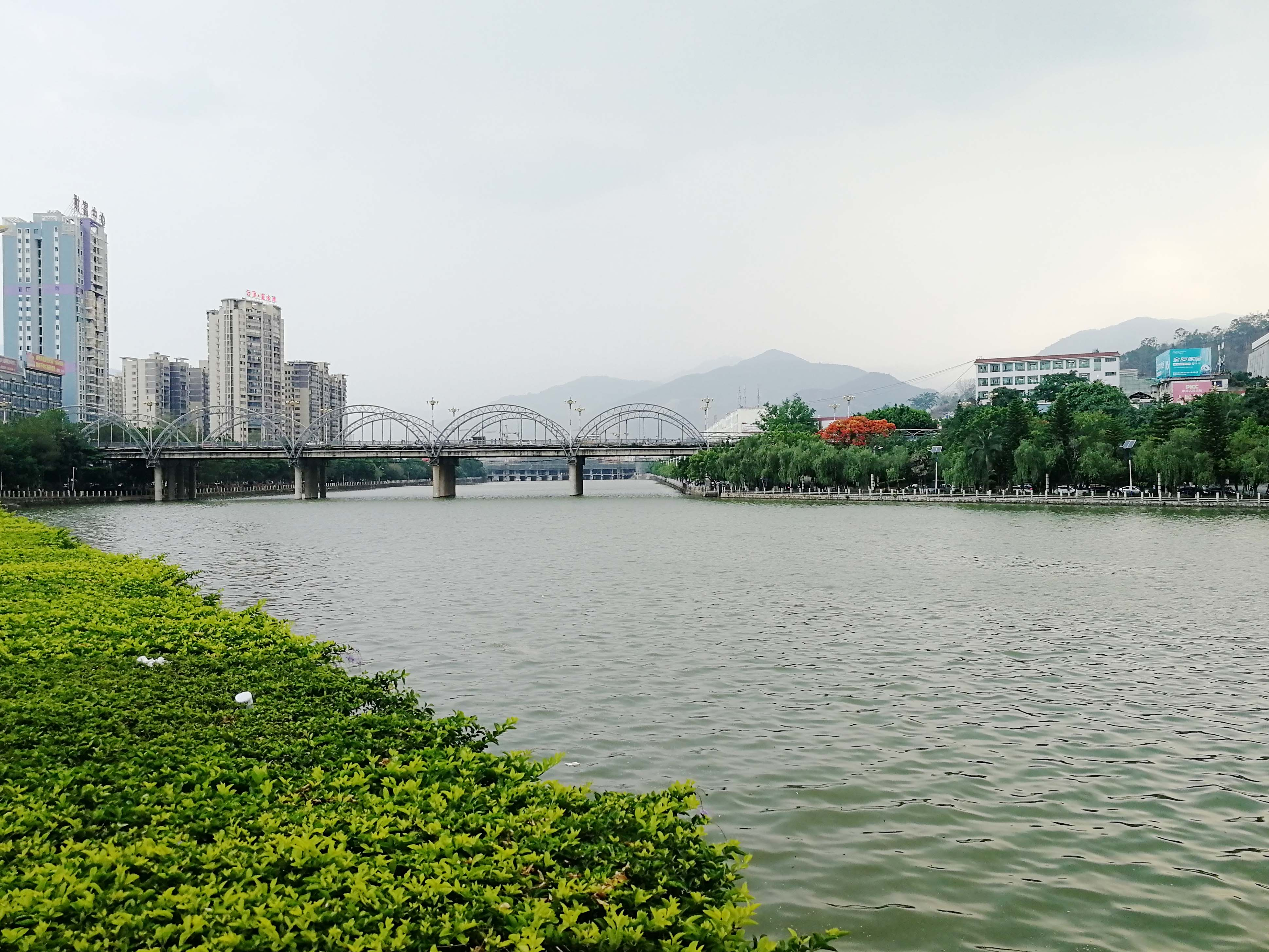 中国临沧市云县县城境内的罗闸河与迎新路大桥。